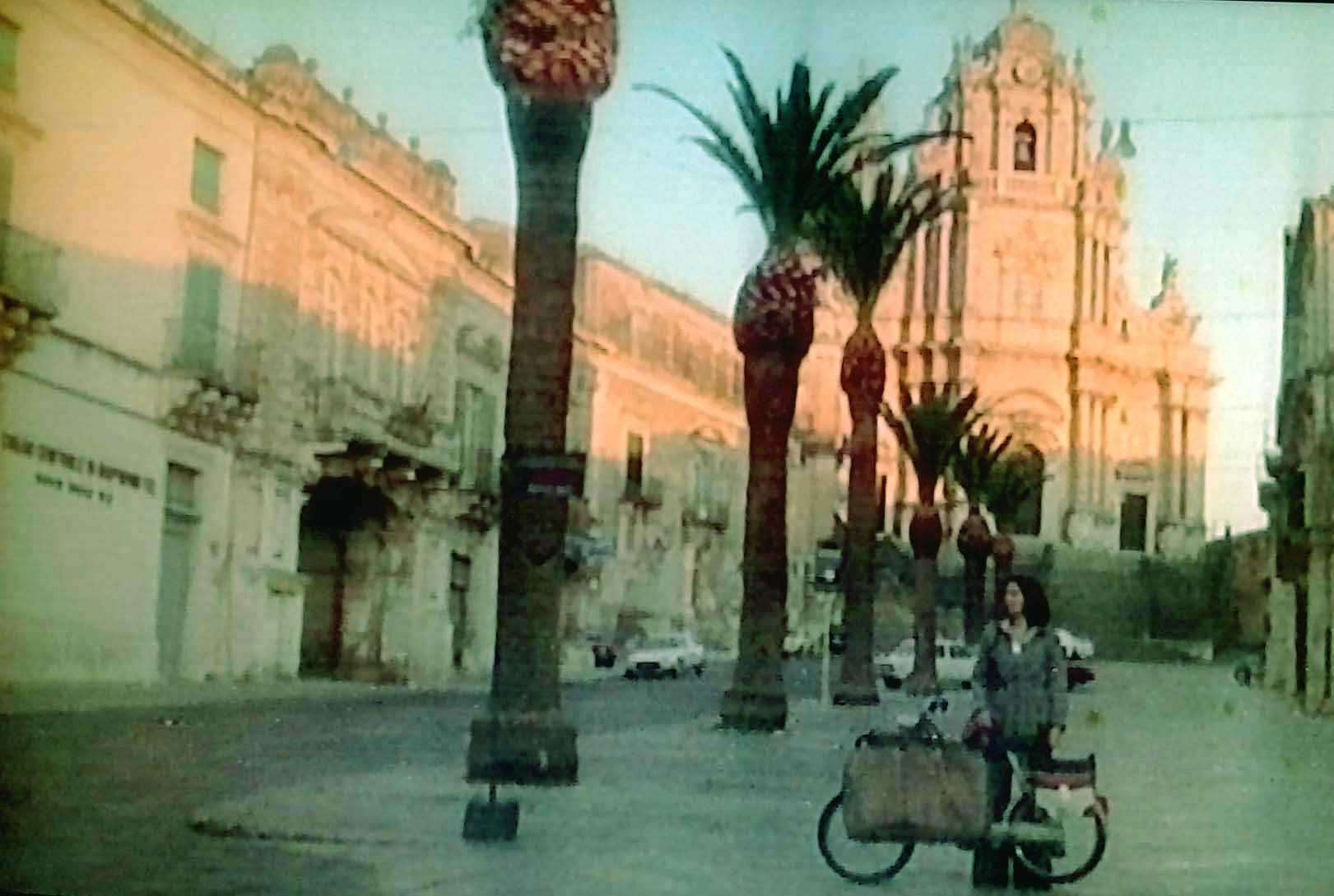 Jennifer O'Neill ripresa sulla piazza barocca di Ragusa in "Gente di rispetto" (Zampa, 1975)